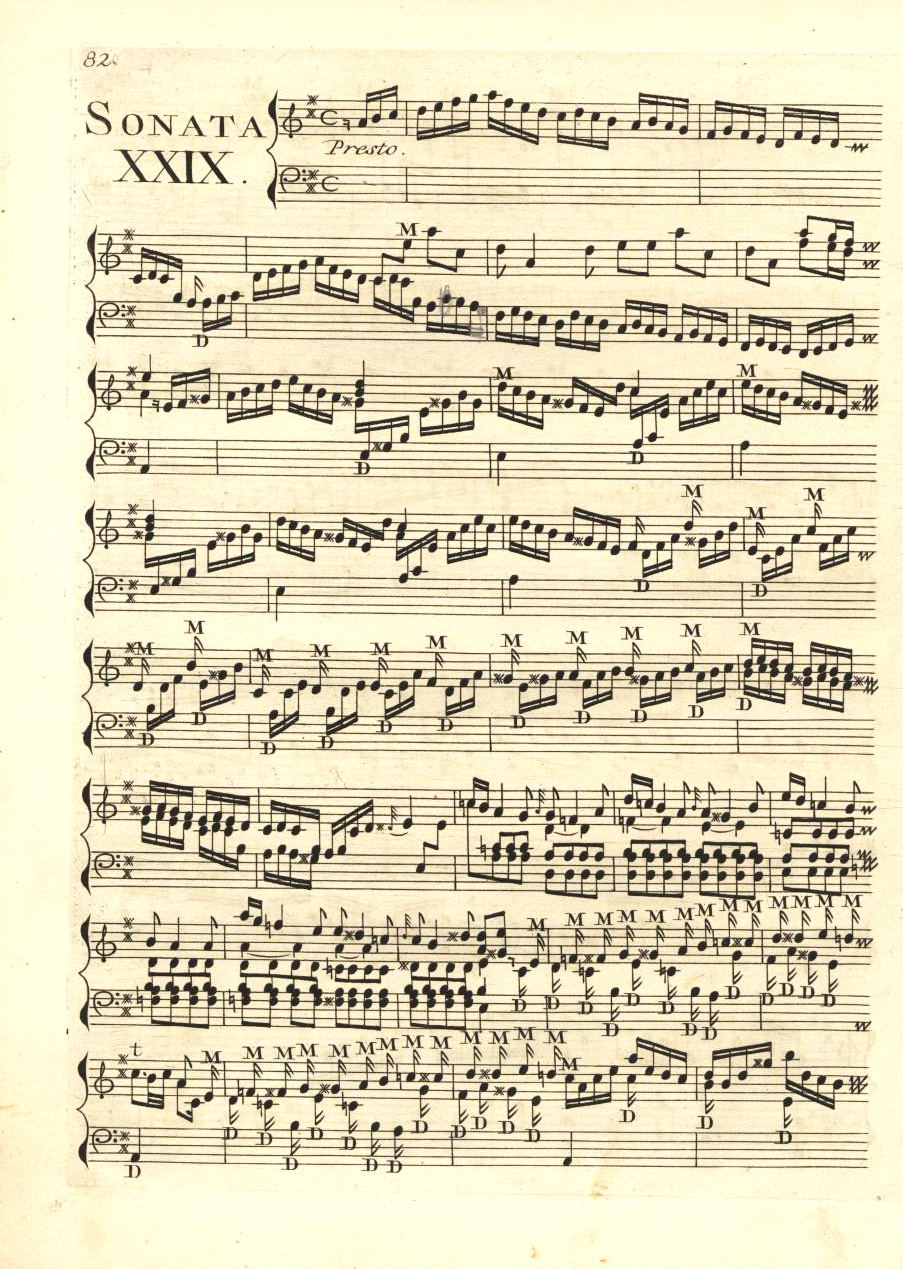 La sonate K. 29, dans une édition des Essercizi per gravicembalo, publiés à Amsterdam en 1742.